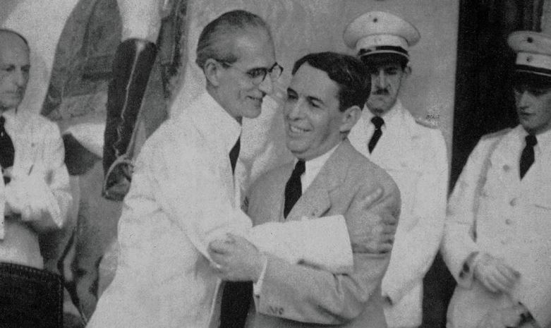 El presidente venezolano Eleazar López Contreras y su homólogo colombiano en 1941.